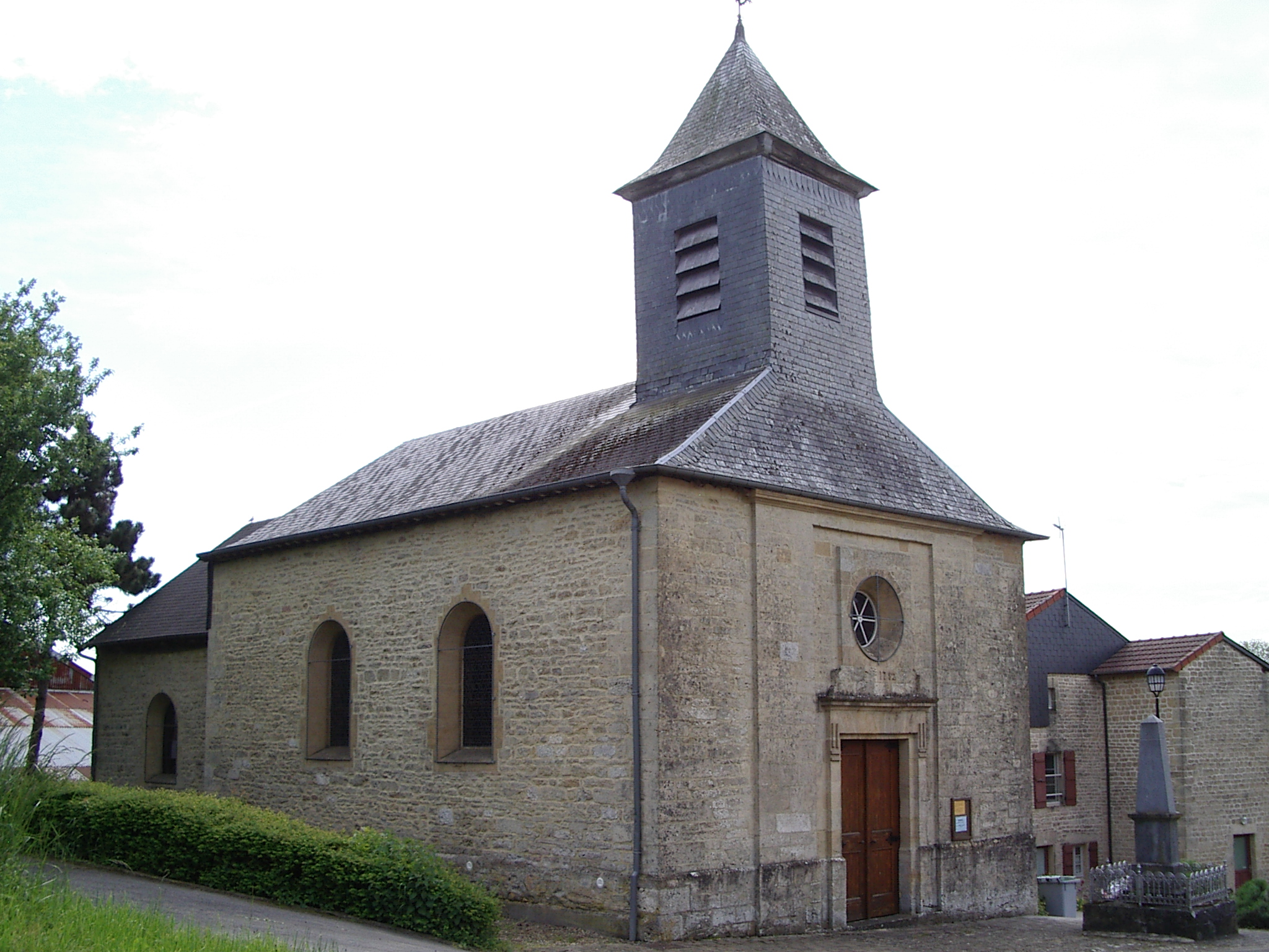 Mondigny, église paroissiale, departement des Ardennes, France